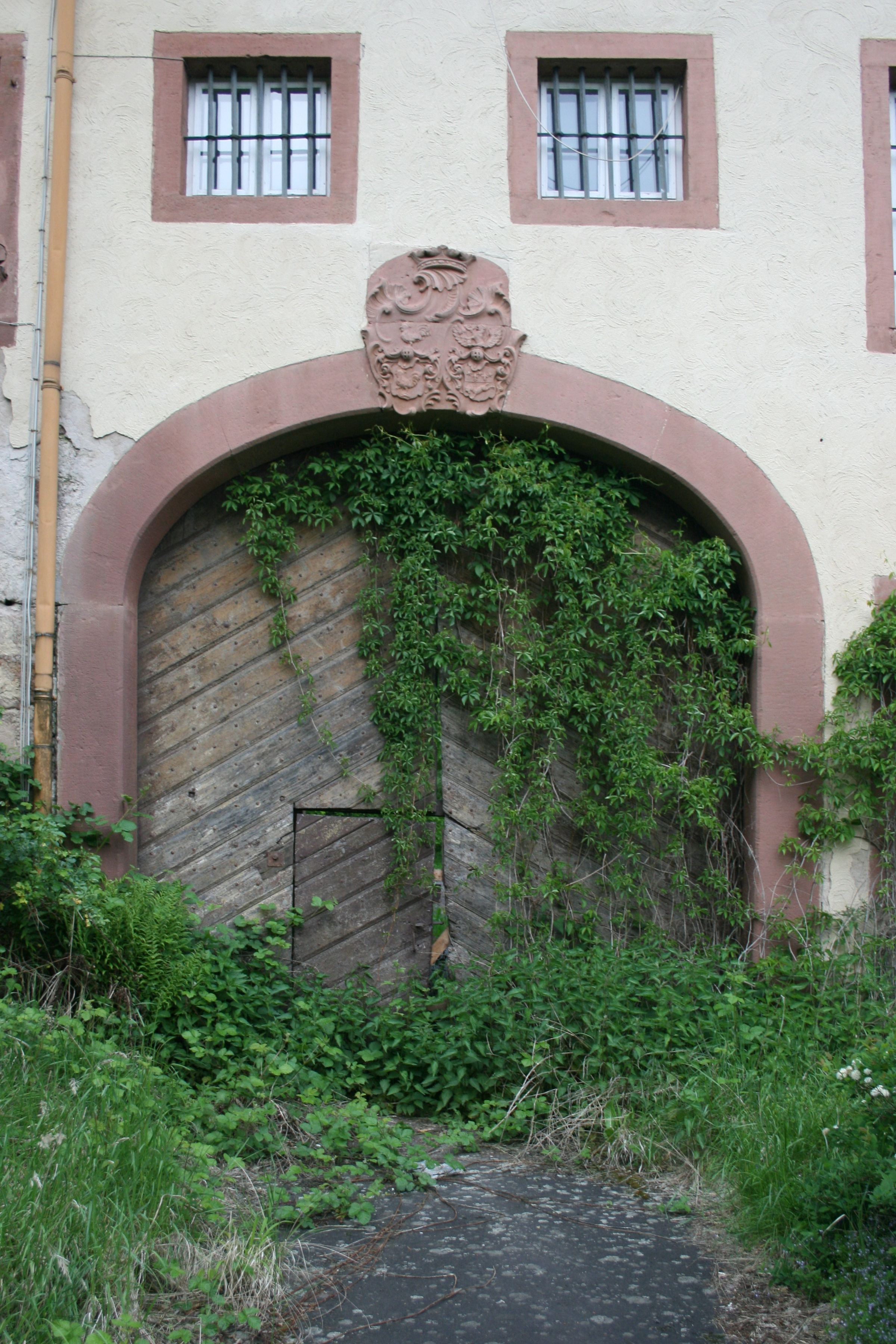 Schloss Eisenhammer bei Brachttal, Hessen, Detail vom Portal mit Allianzwappen: Heraldisch links: Rühle von Lilienstern; heraldisch rechts: Wappen der von Haan